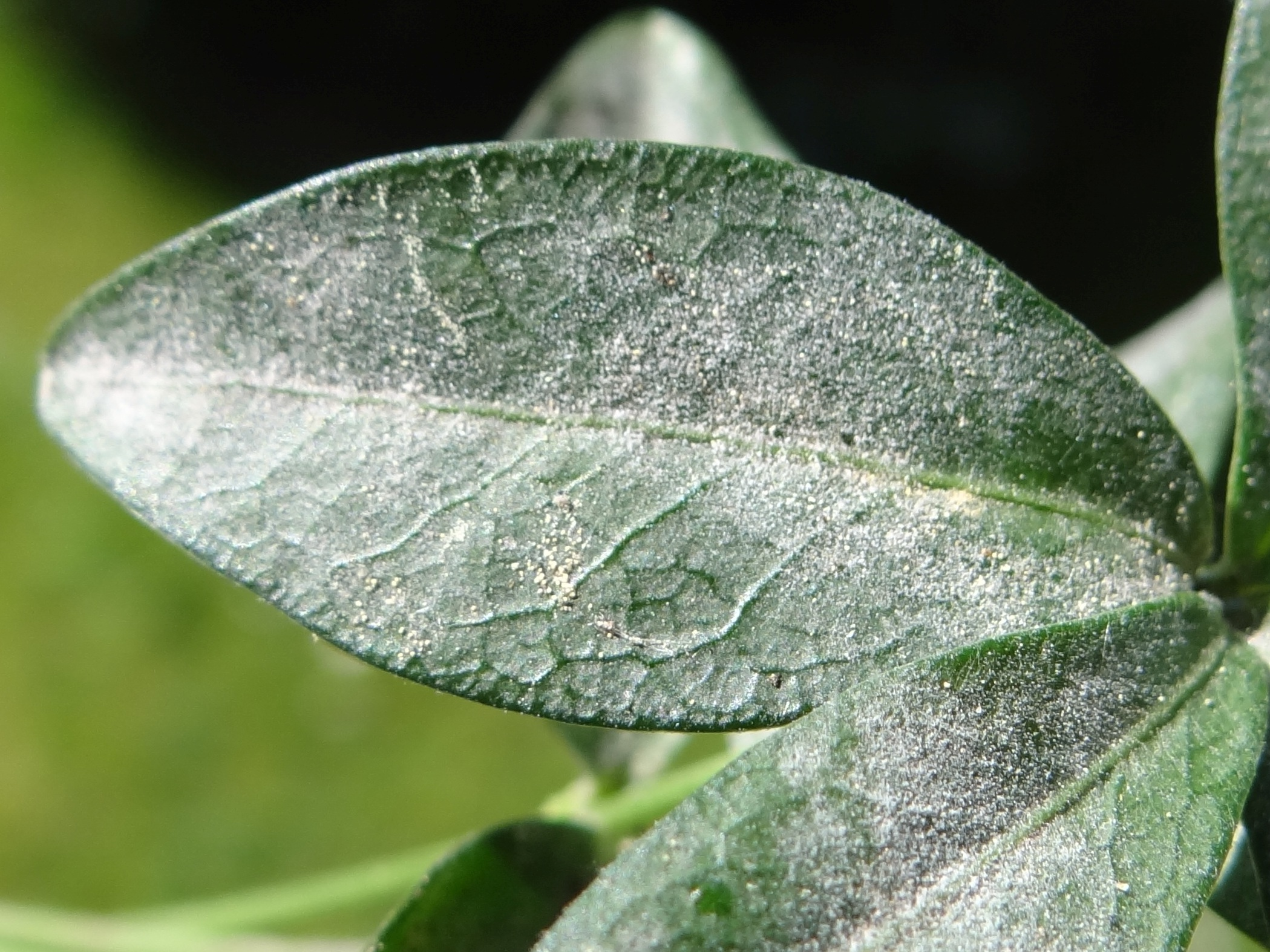 Golovinomyces orontii on leaf Vinca minor. Location: Poland, Trzciana, województwo małopolskie